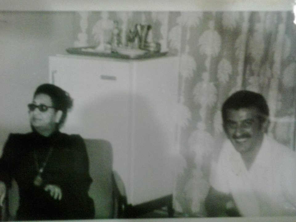 صورة للشاعر العربي الفلسطيني محمود رضا حامد مع السيدة أم كلثوم